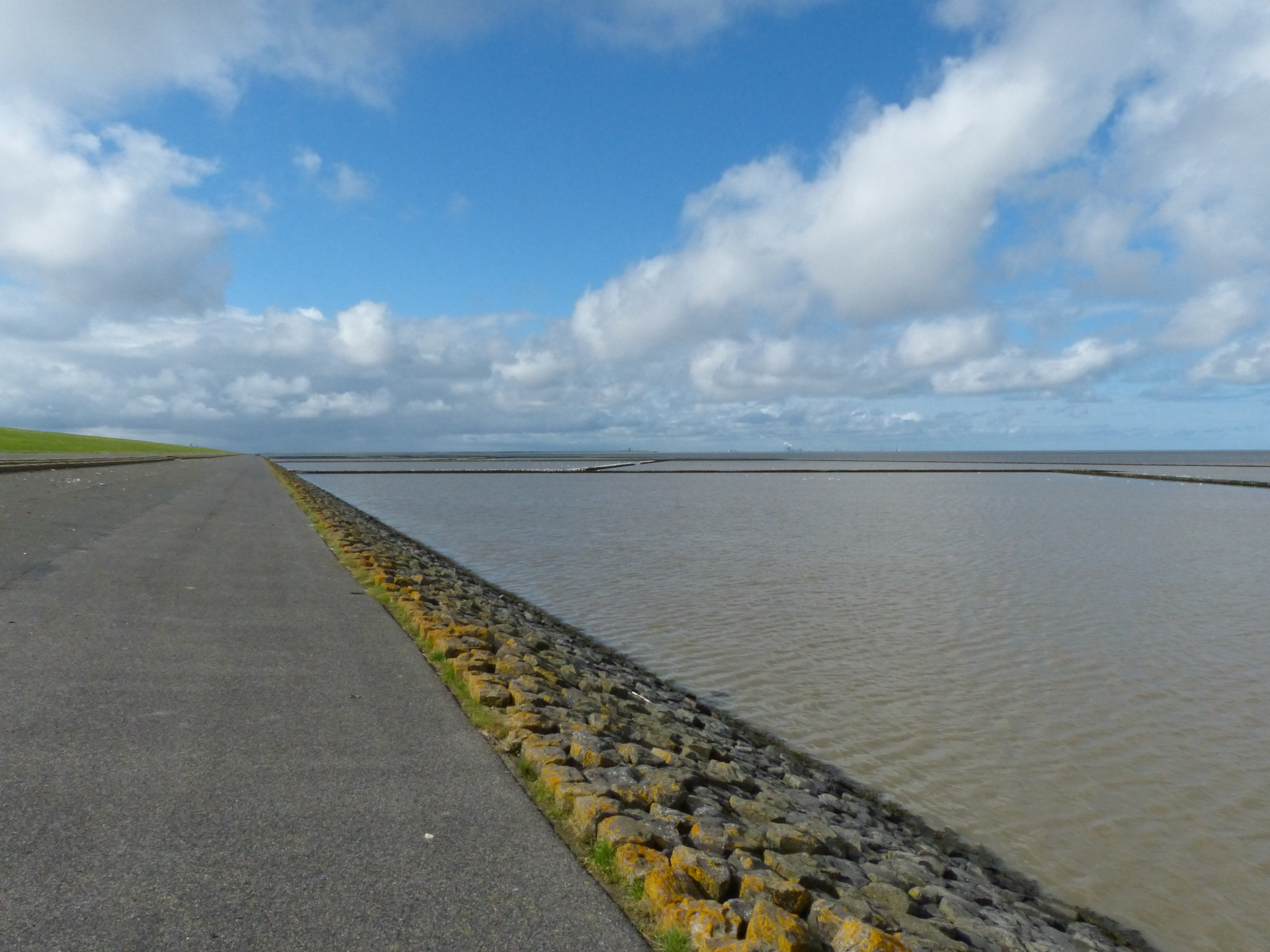 Deichfuß des Norderländer Seedeichs bei Norddeich südwestwärts